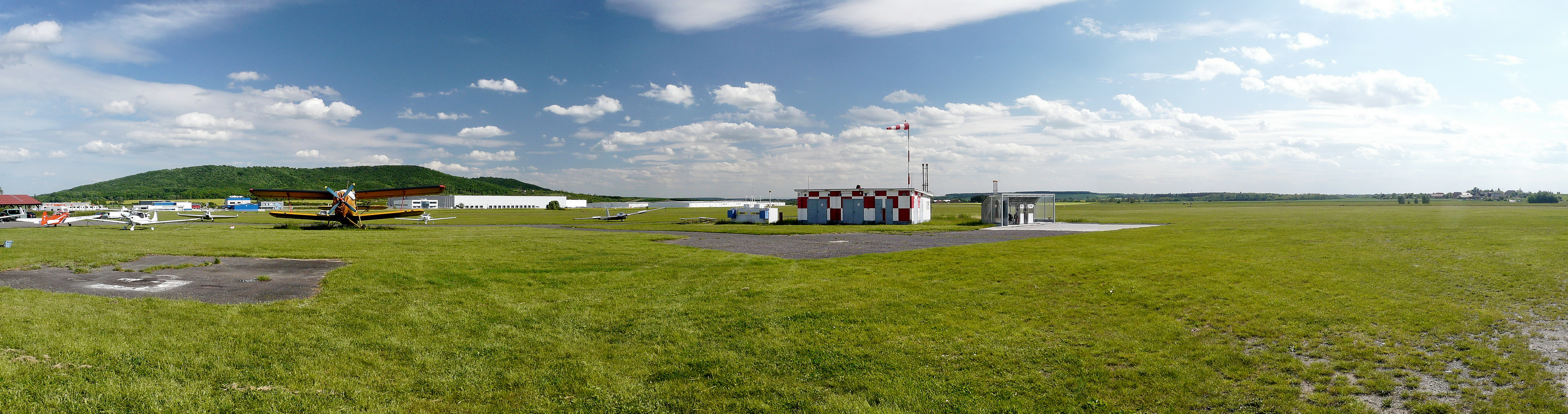 Letiště Mladá Boleslav, Chlum, PP Bezděčín